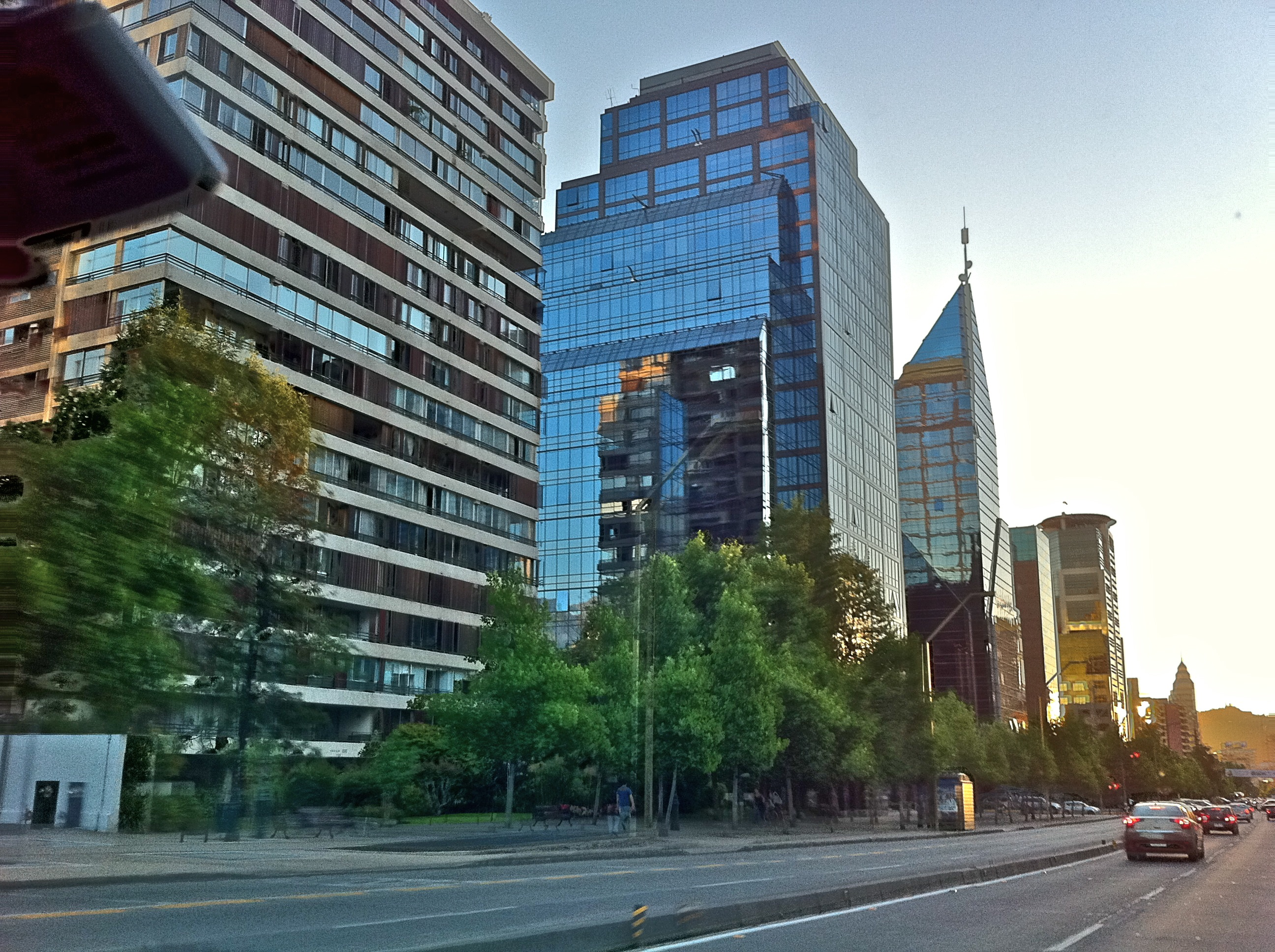 Santiago de Chile